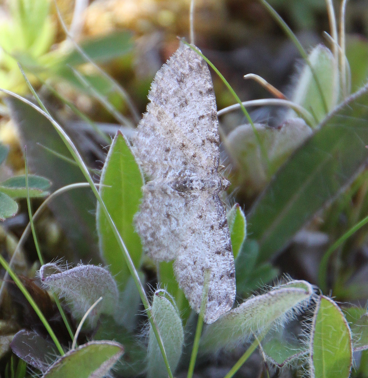 Adult specimen of Aethalura intertexta